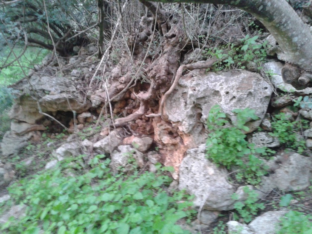 Talaïot 1